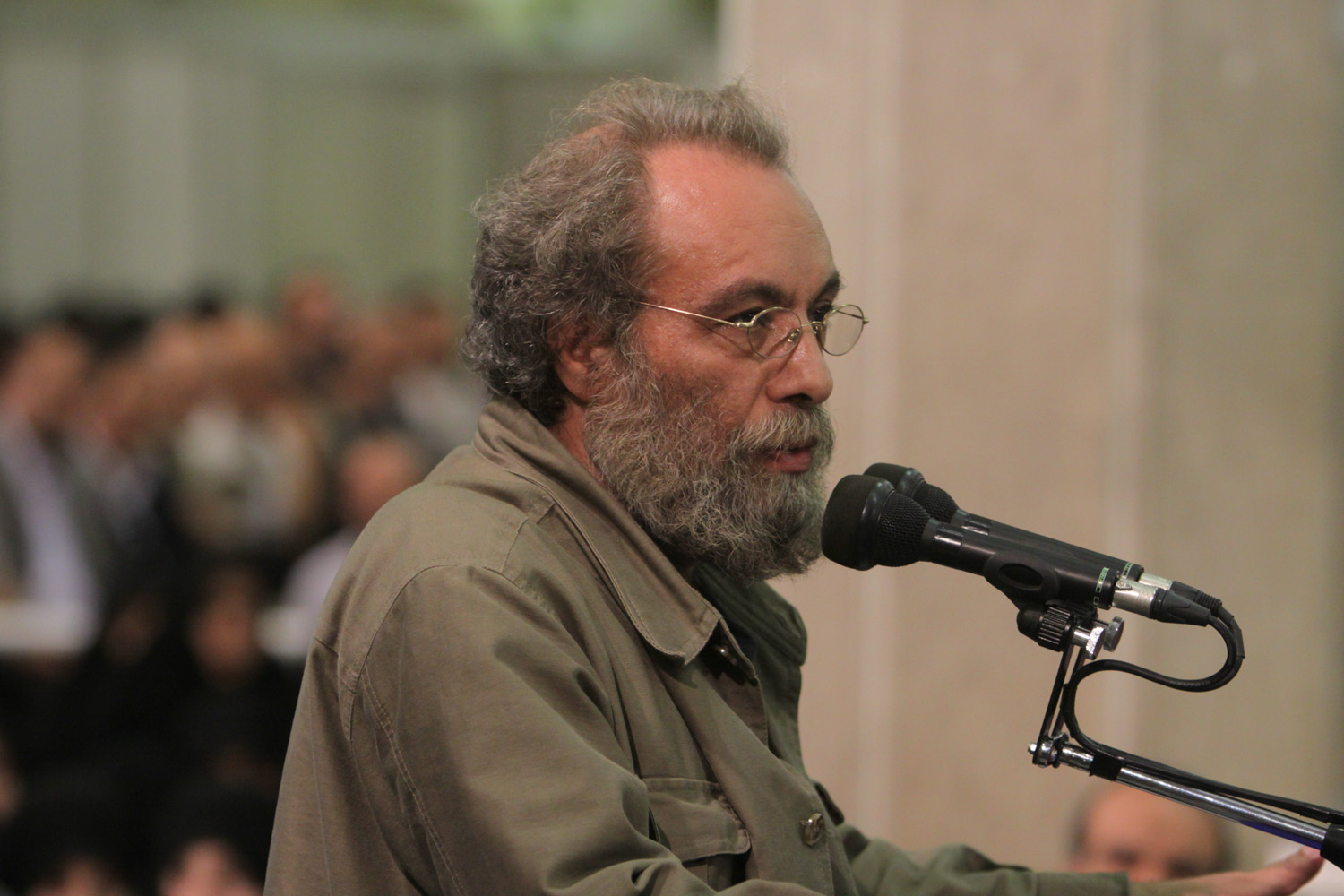 مسعود فراستی در «دیدار فعالان عرصه هنر دفاع مقدس» با سید علی خامنه‌ای